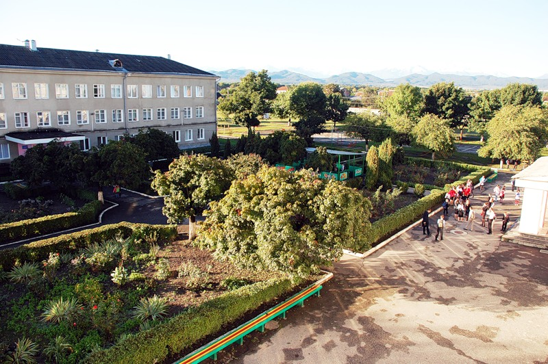 Во дворе школы в Нартане